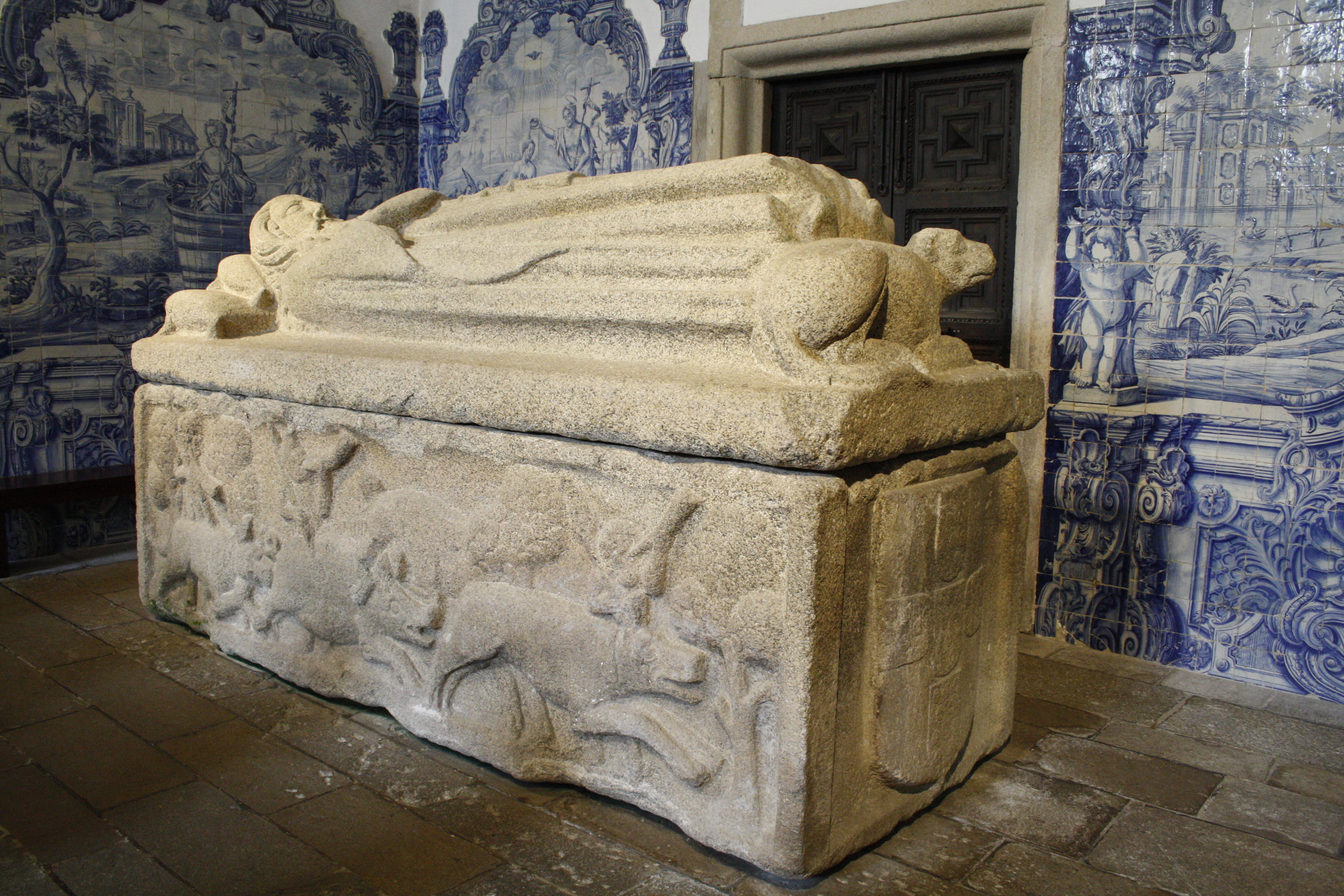 Túmulo de Dom Pedro Afonso, Conde de Barcelos. Mosteiro de São João de Tarouca. O túmulo apresenta uma cena de caça ao javali com cães (possivelmente o extinto Alão português) e lanças.